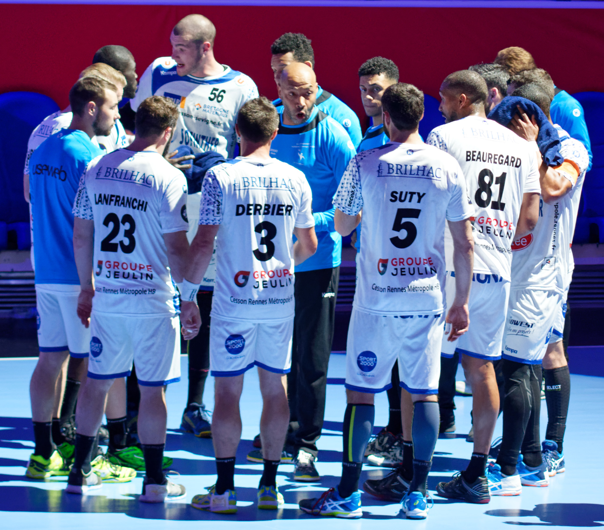 Rencontre de Championnat de LidlStarLigue entre le PSG et Cesson-Rennes Métropole. A Coubertin, le 19 avril 2017.